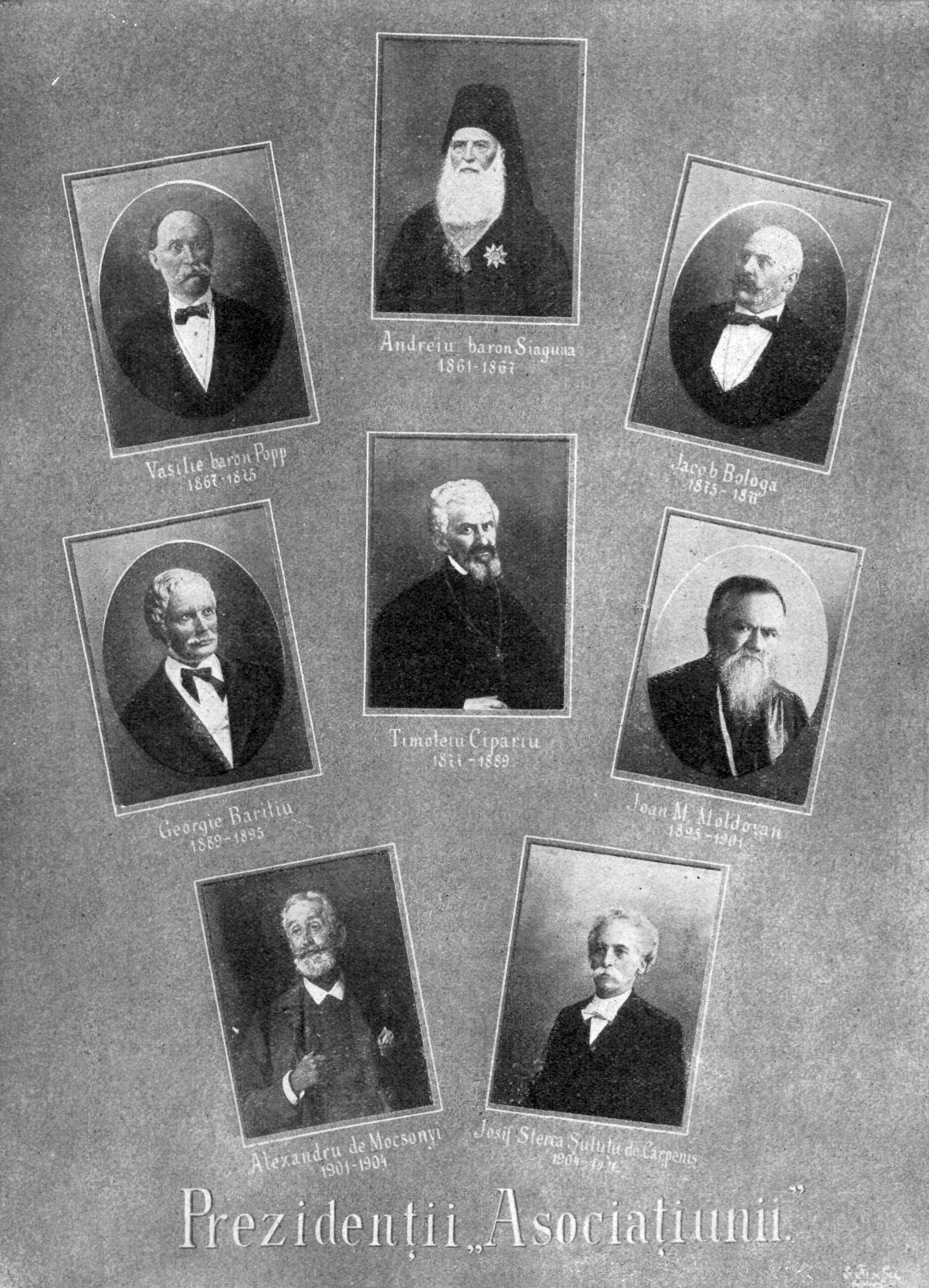 Președinții Asociației Transilvane pentru Literatura Română și Cultura Poporului Român - ASTRA - SIBIU